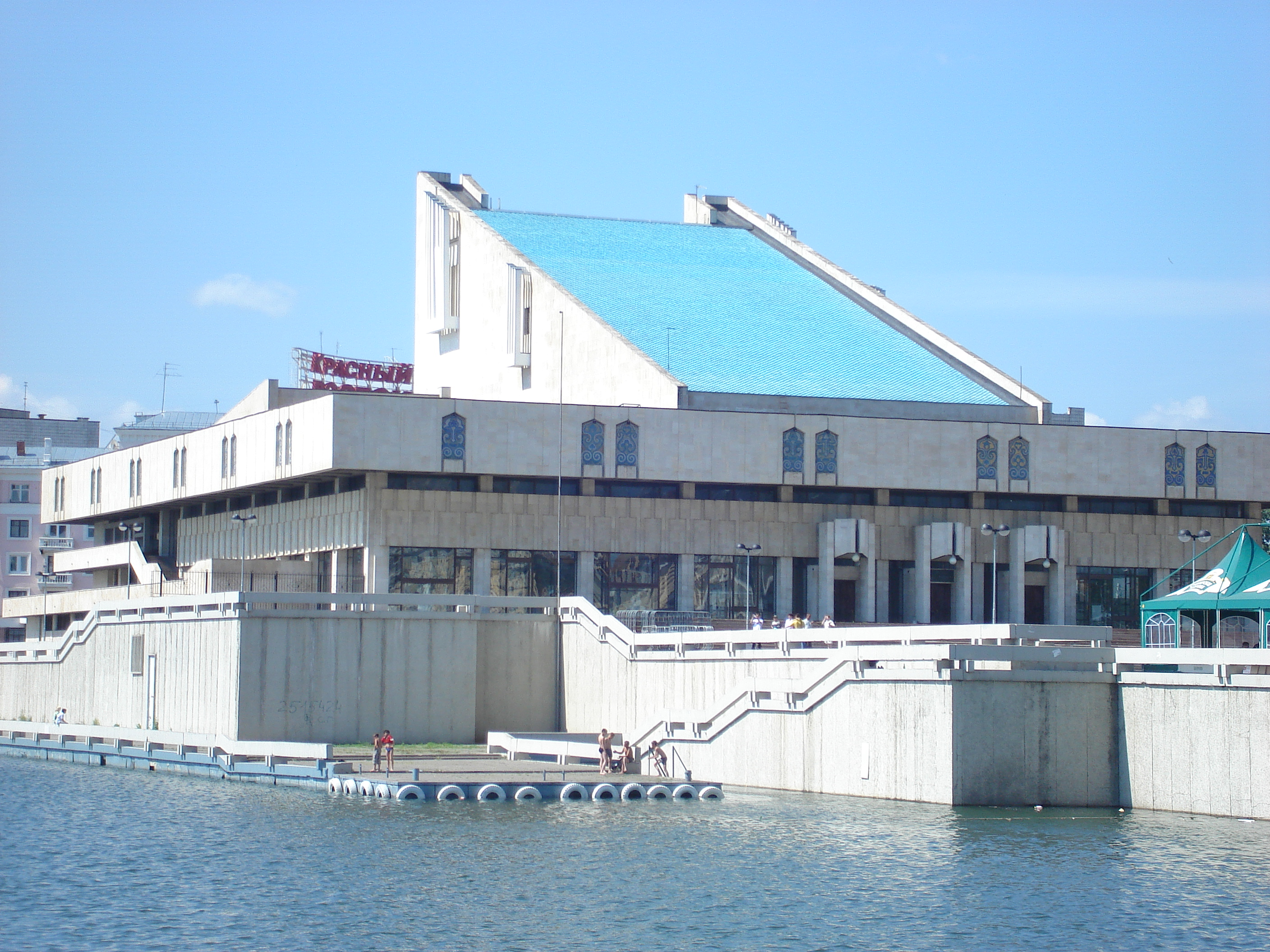 Kamal theatre Kamal teatrı Театр Камала